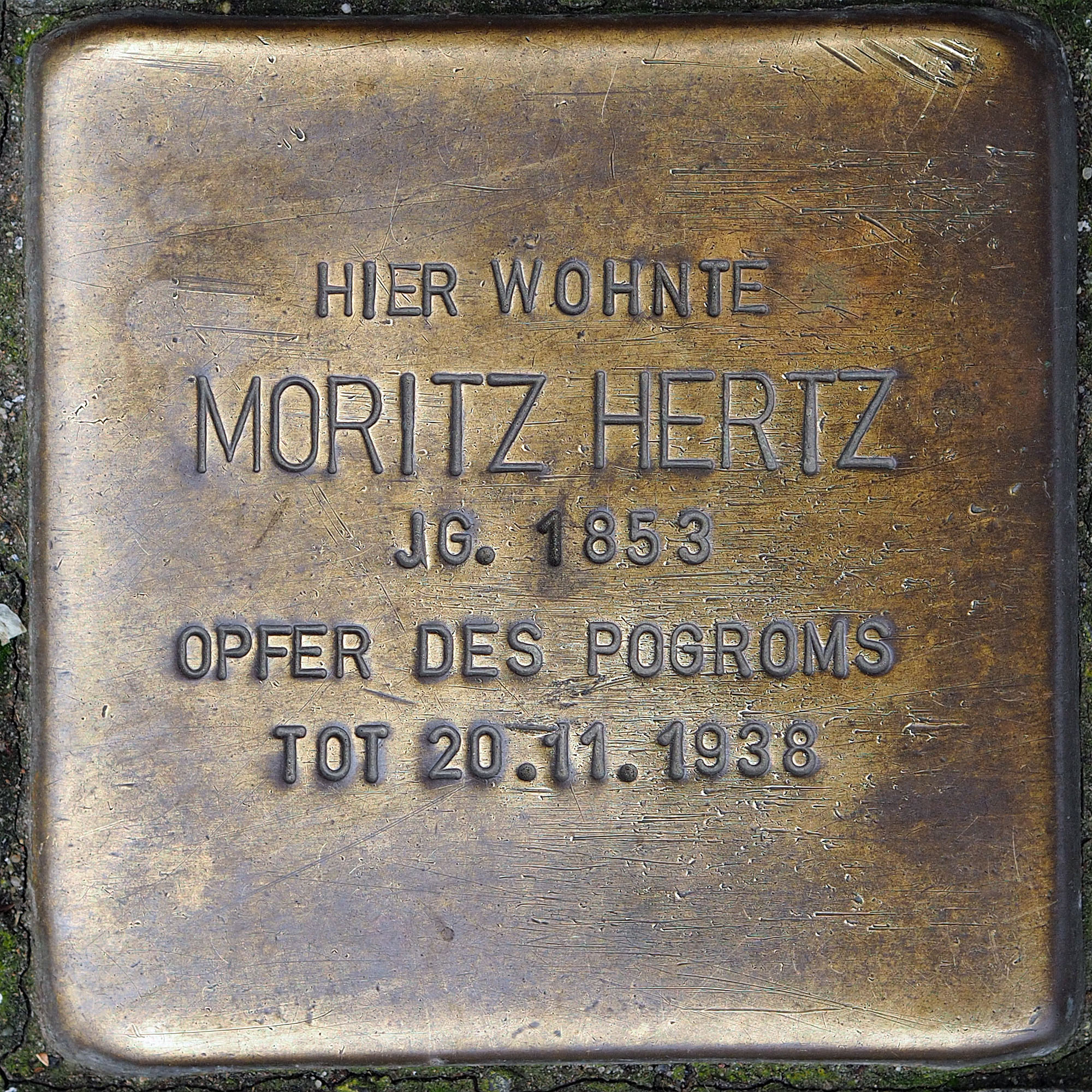 Stolpersteine GV: Hertz, Moritz